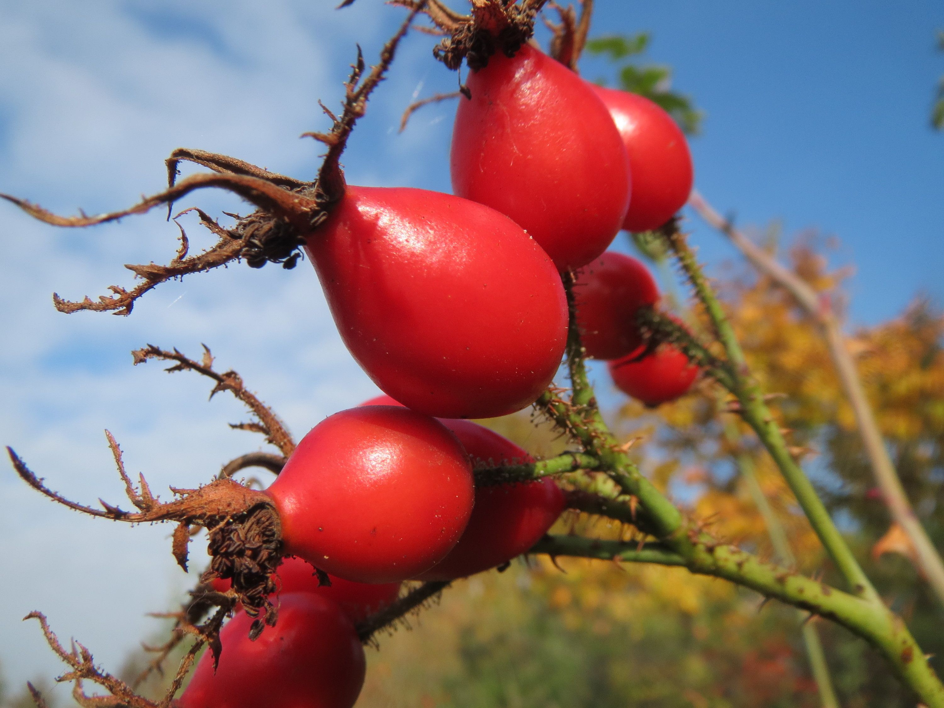 Hagebutten der Wein-Rose (Rosa rubiginosa) in Hockenheim - im Unterschied zur häufigeren Hundsrose sind die Stiele drüsig behaart